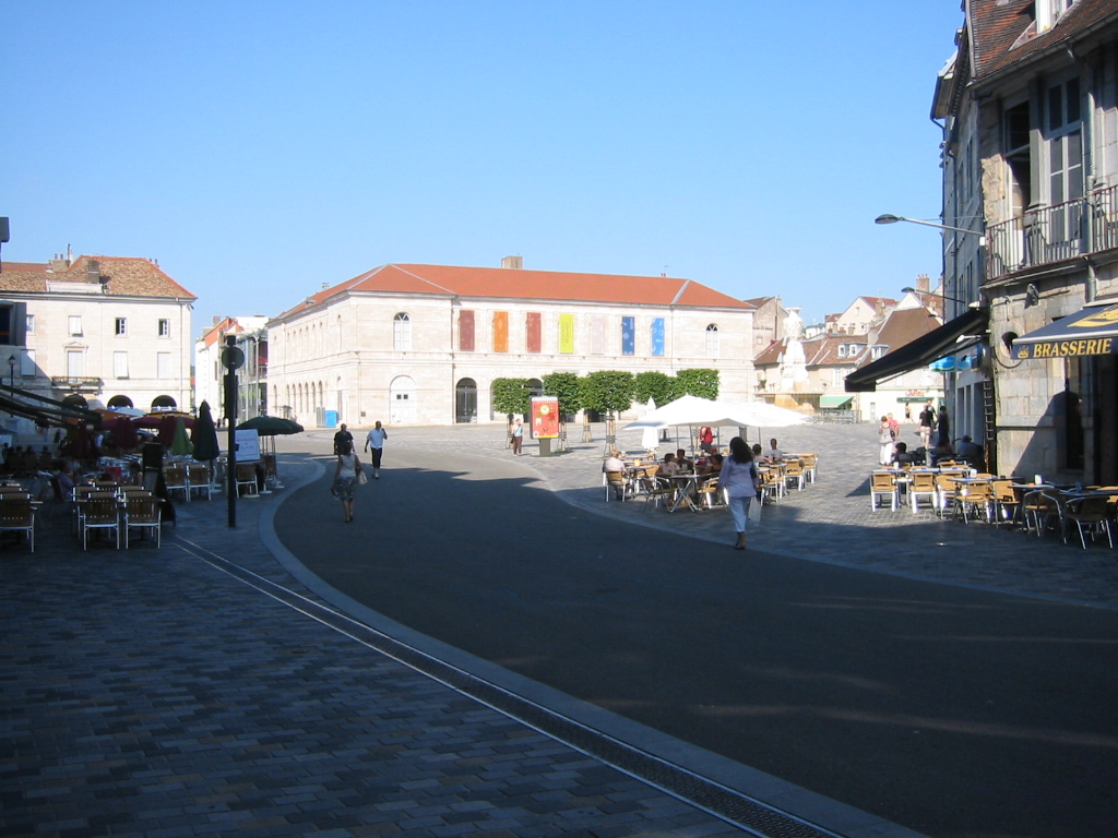 Place de la Révolution et Musée des Beaux Art de Besancon